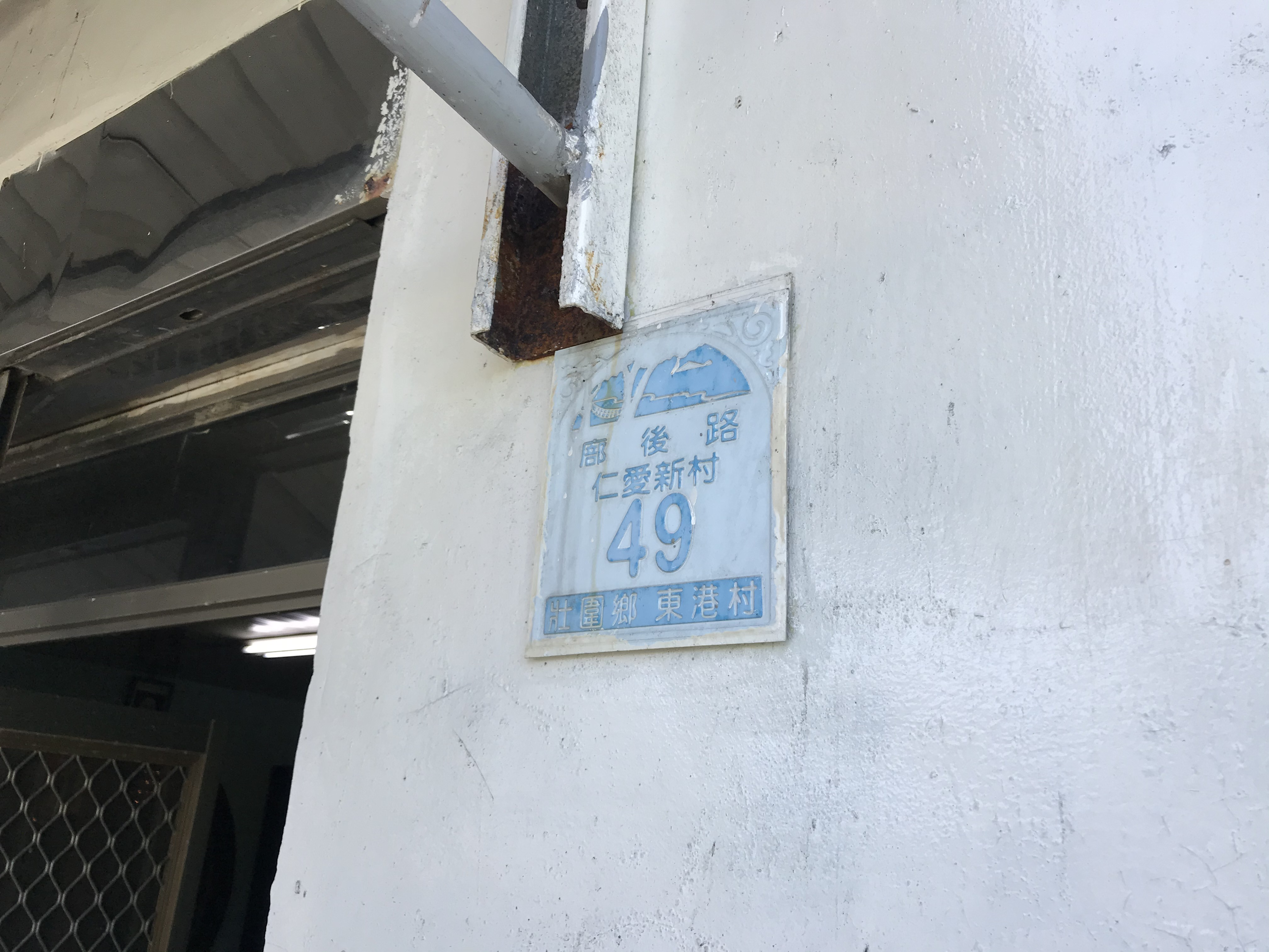 中文（台灣）: 壯圍東港漁師廟門牌